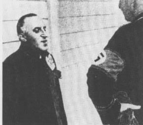 Immagine proveniente da enwiki, rilasciata con licenza